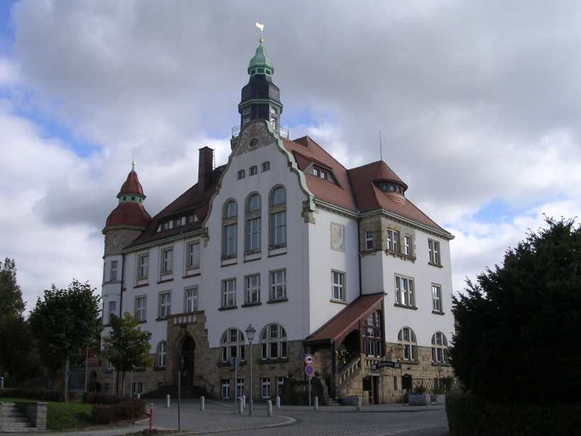 Rathaus der Stadt Großröhrsdorf (Sachsen).